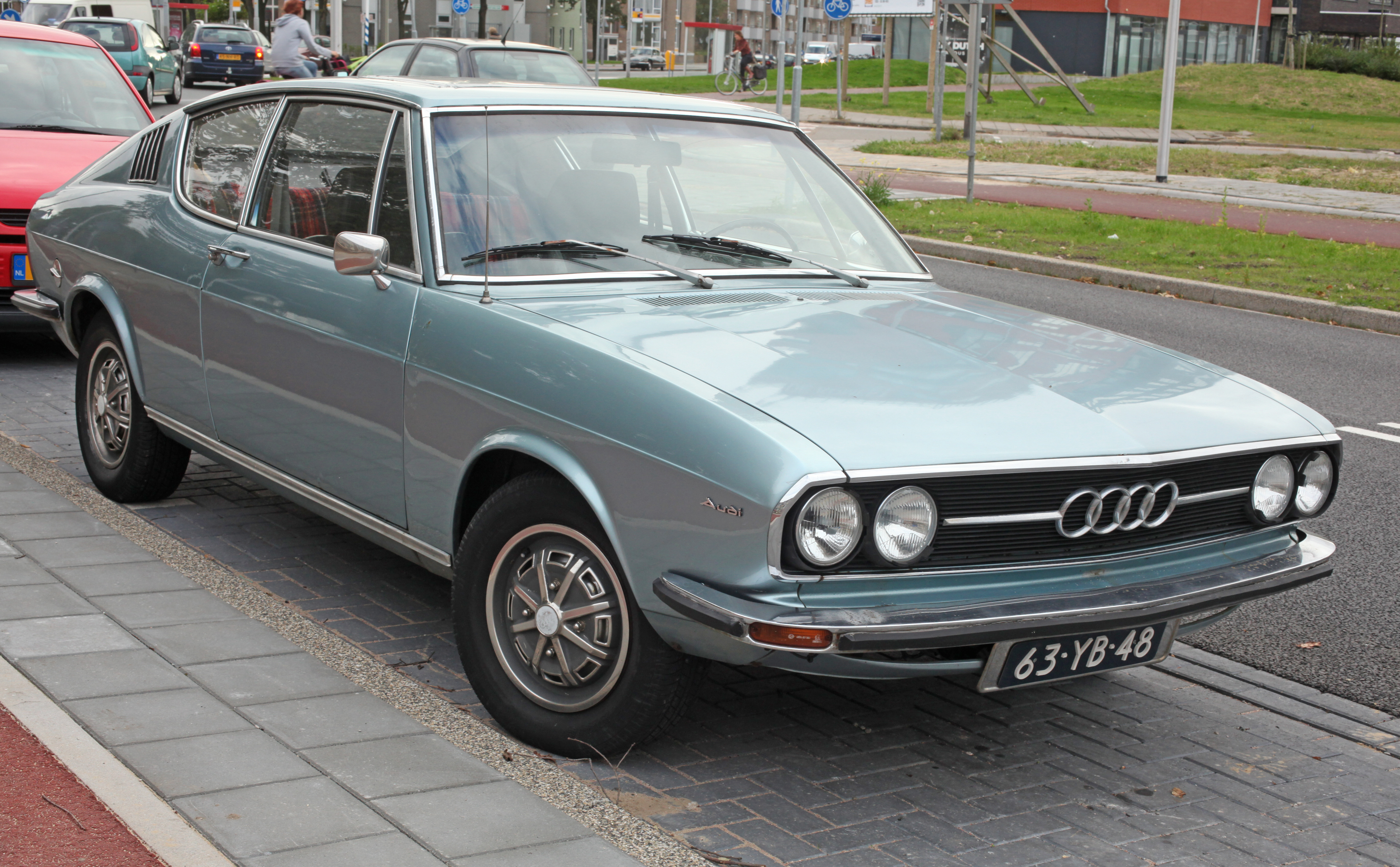 Audi 100 C1 Coupe S Automatic (Baujahr 1974)